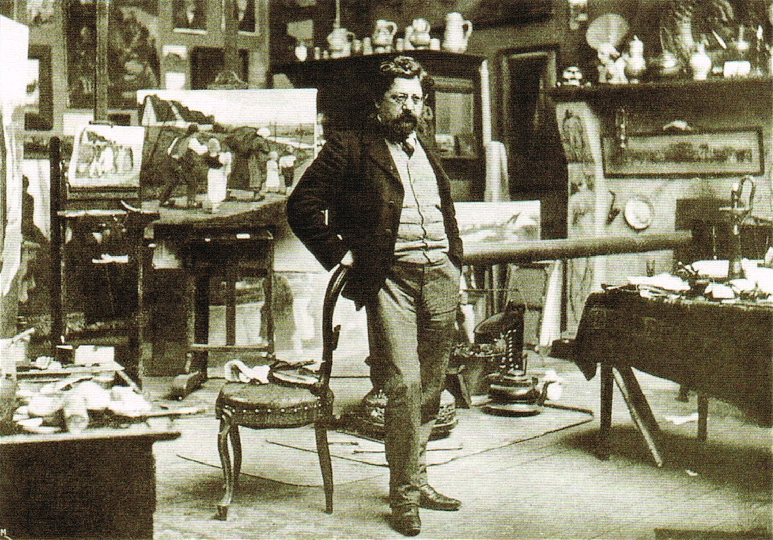 Eugène Laermans dans son atelier